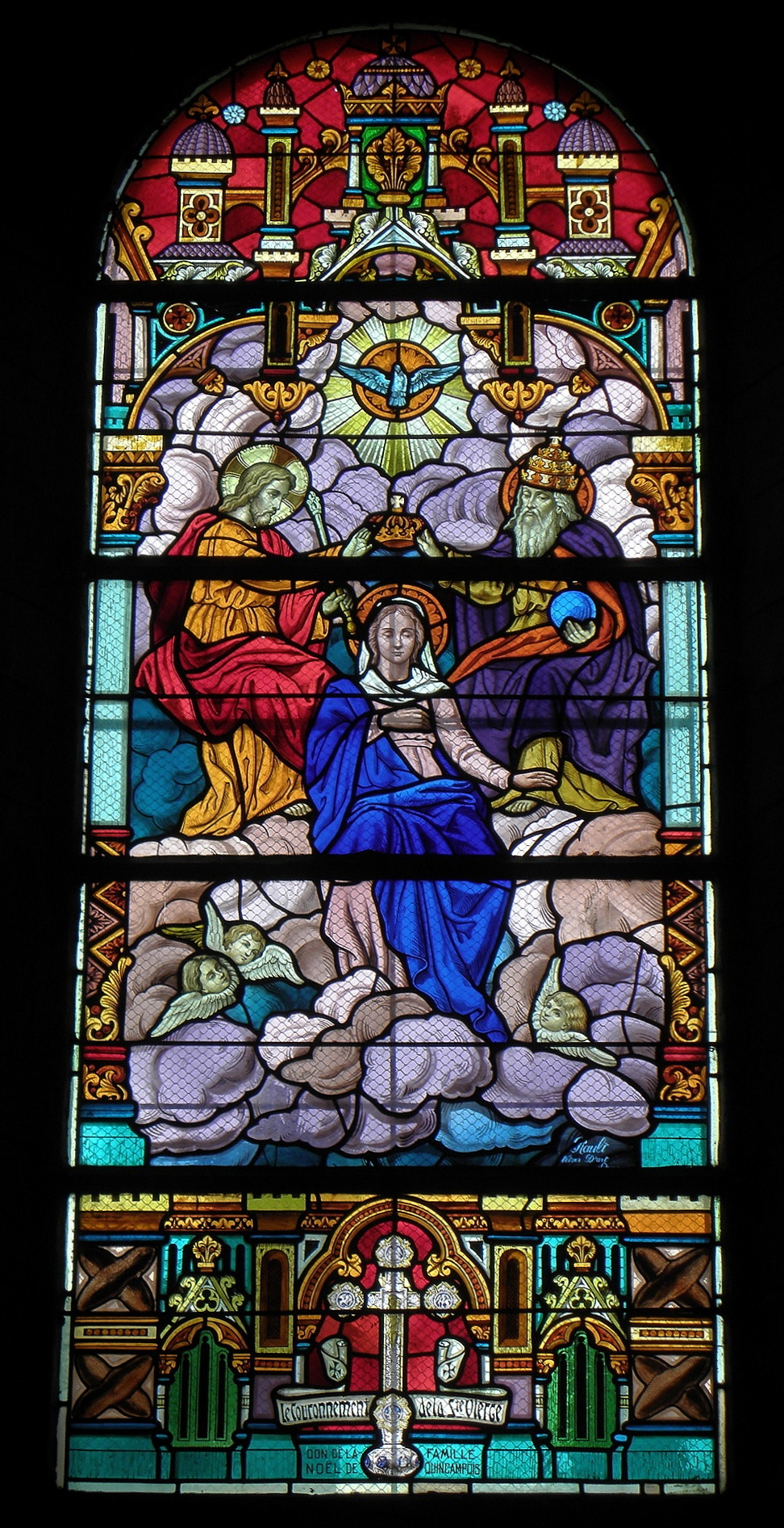 Église Notre-Dame de Rimou (35). Intérieur. Vitrail. Couronnement de la Vierge par la Trinité.